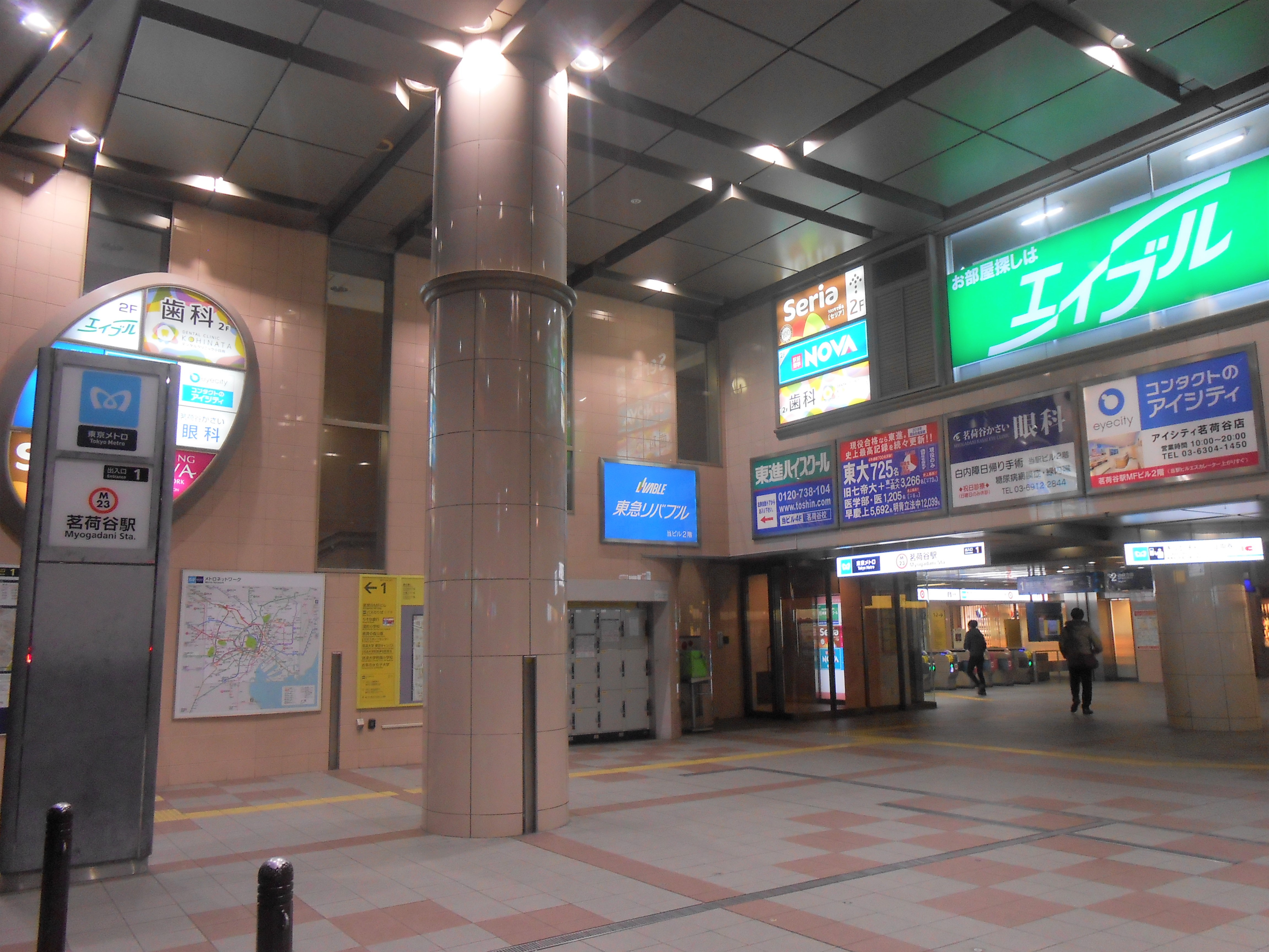 茗荷谷駅2番出口